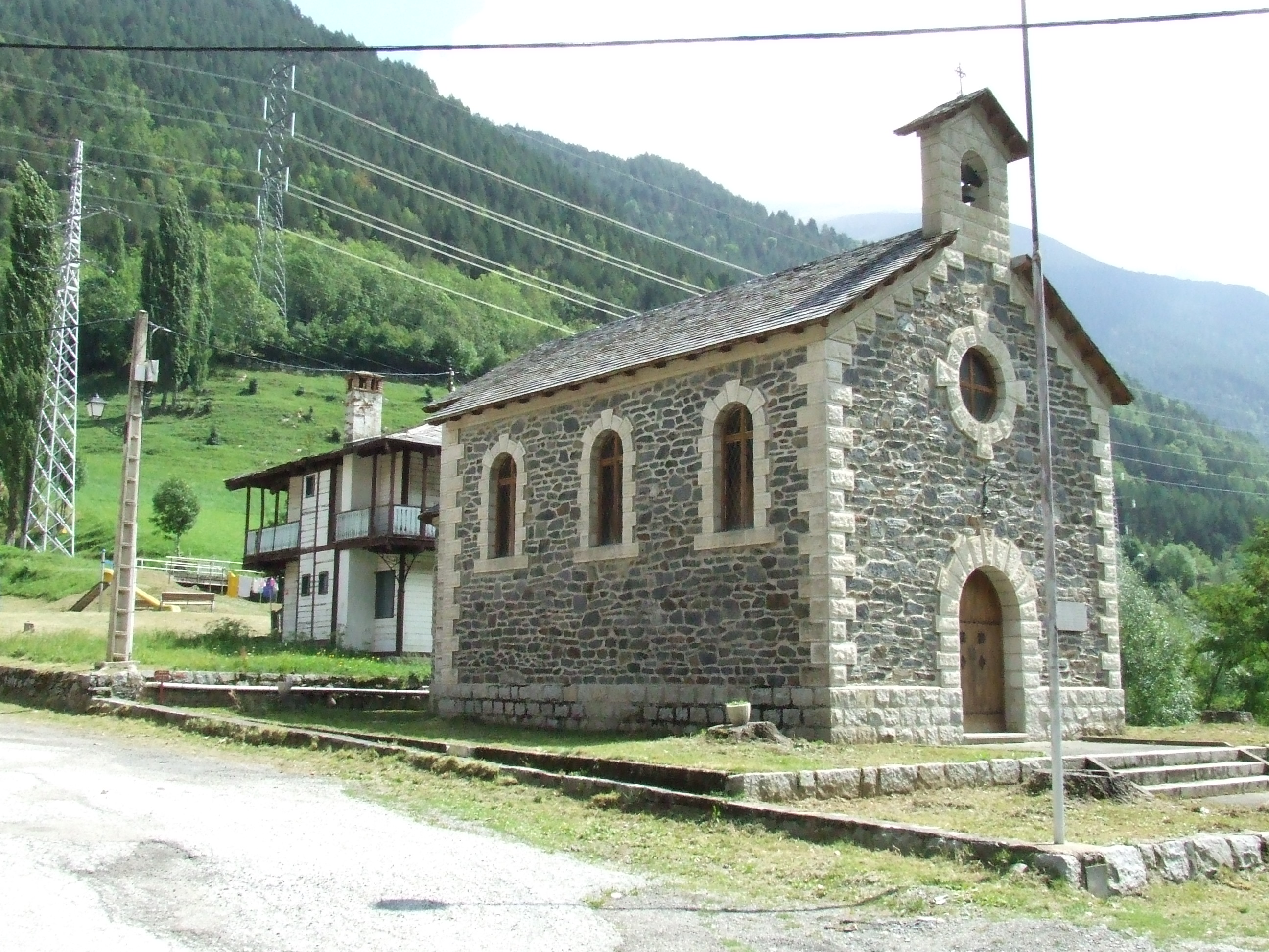 La Mare de Déu de Montserrat de la Central de Cabdella (la Torre de Cabdella, Pallars Jussà)